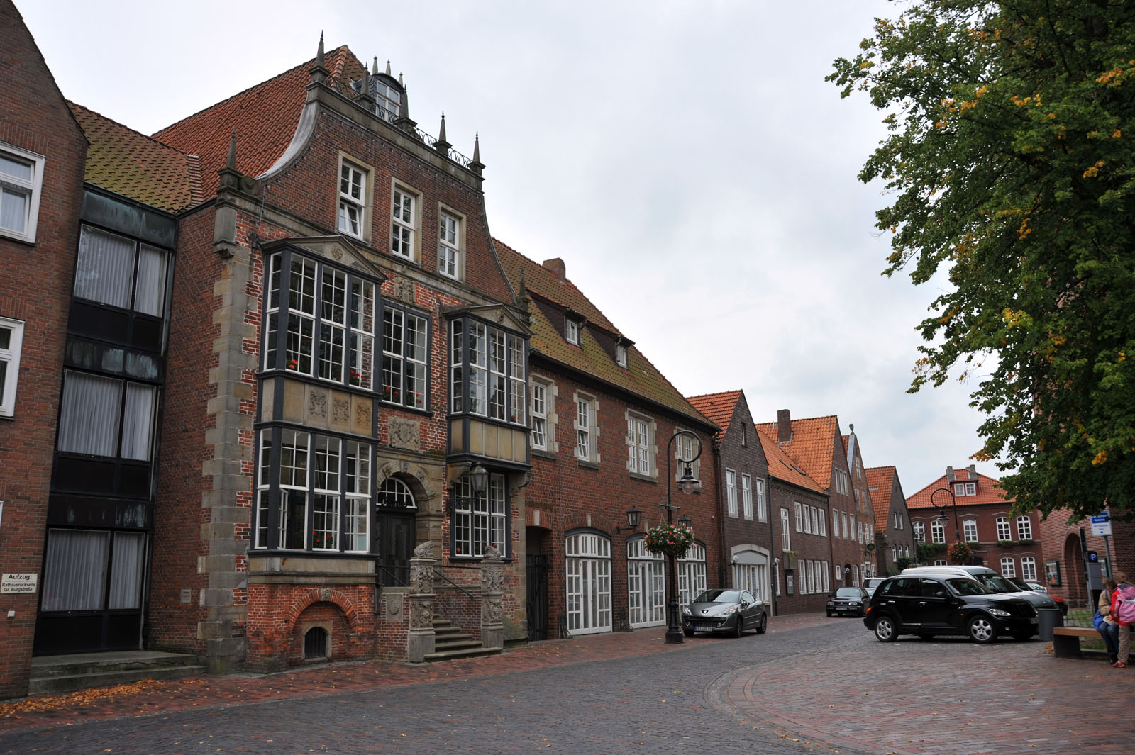 Rathaus der Stadt Jever, Niedersachsen